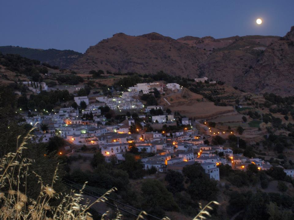 Busquistar al atardecer